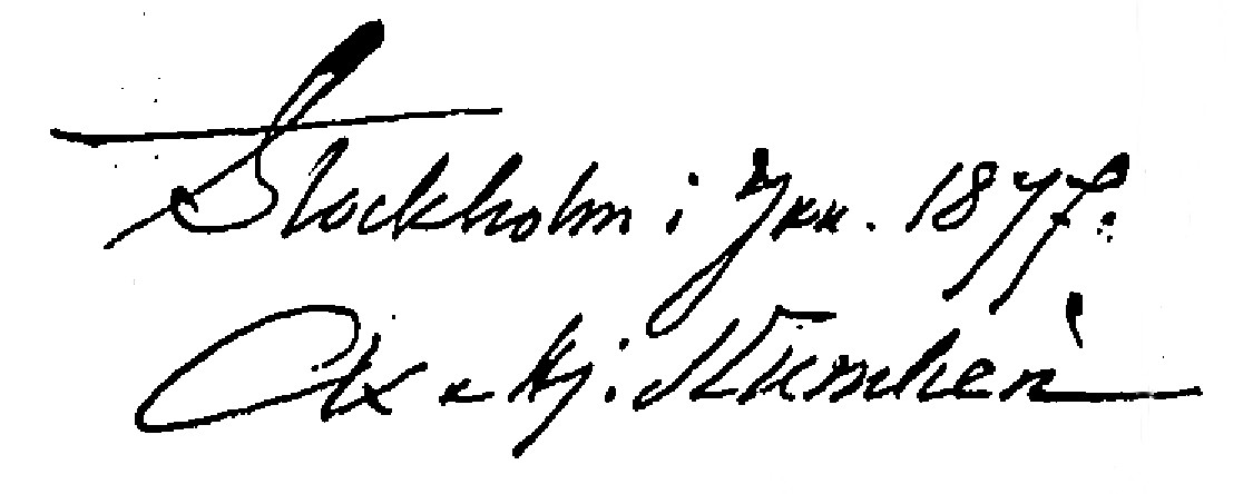 Axel och Hjalmar Kumliens namnteckning